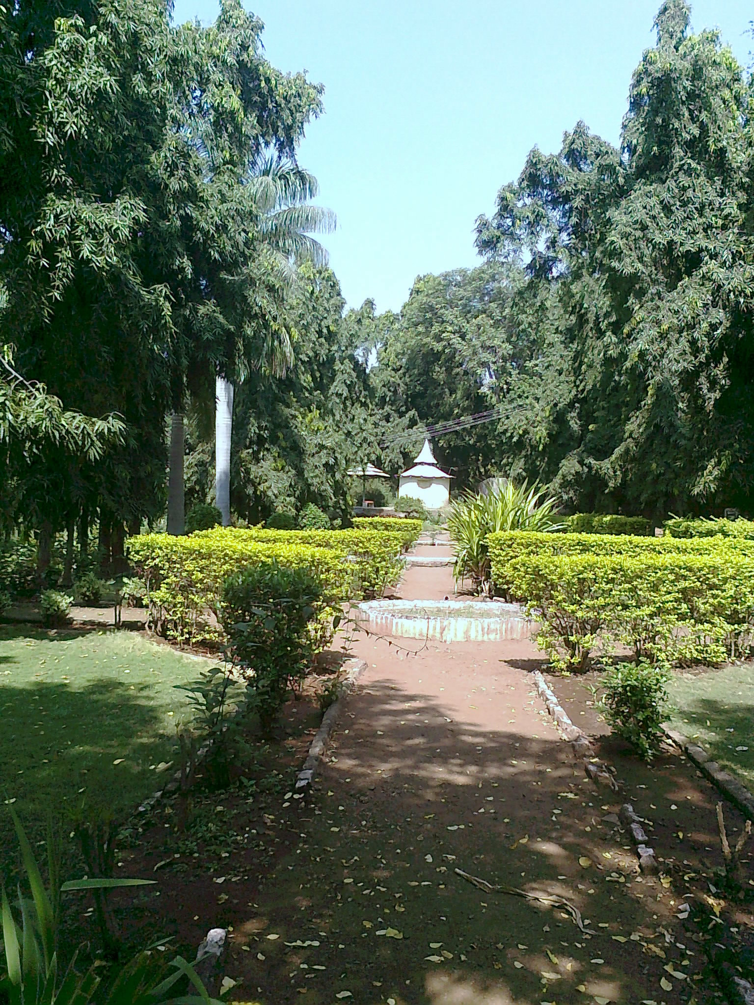 Garden at Pal village, Jalgaon district, India.